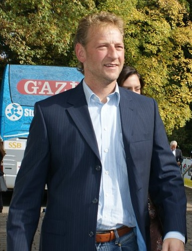 Reinhold Tattermusch 2011 beim Jubiläumsspiel der Stuttgarter Kickers